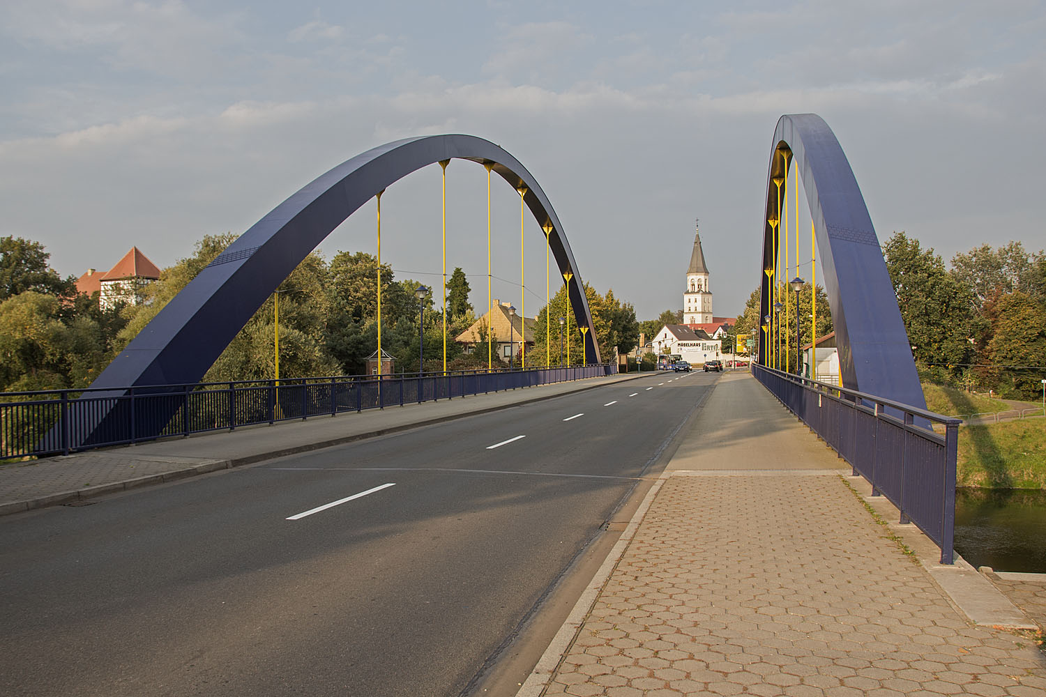 Muldebrücke Bad Düben, Stadteinfahrt aus Richtung Leipzig